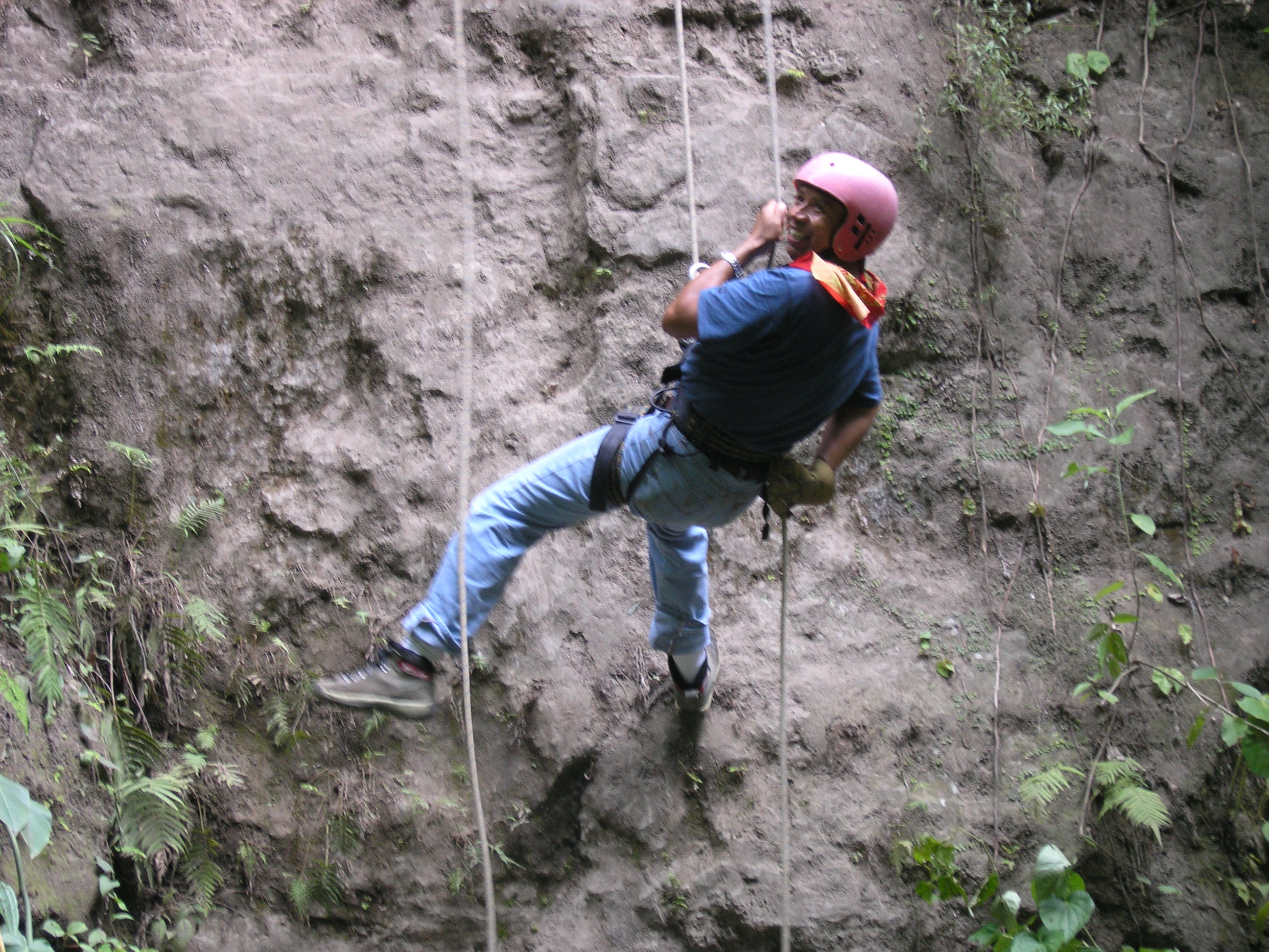 Chica haciendo tirolesa en Veracruz Jalcomulco